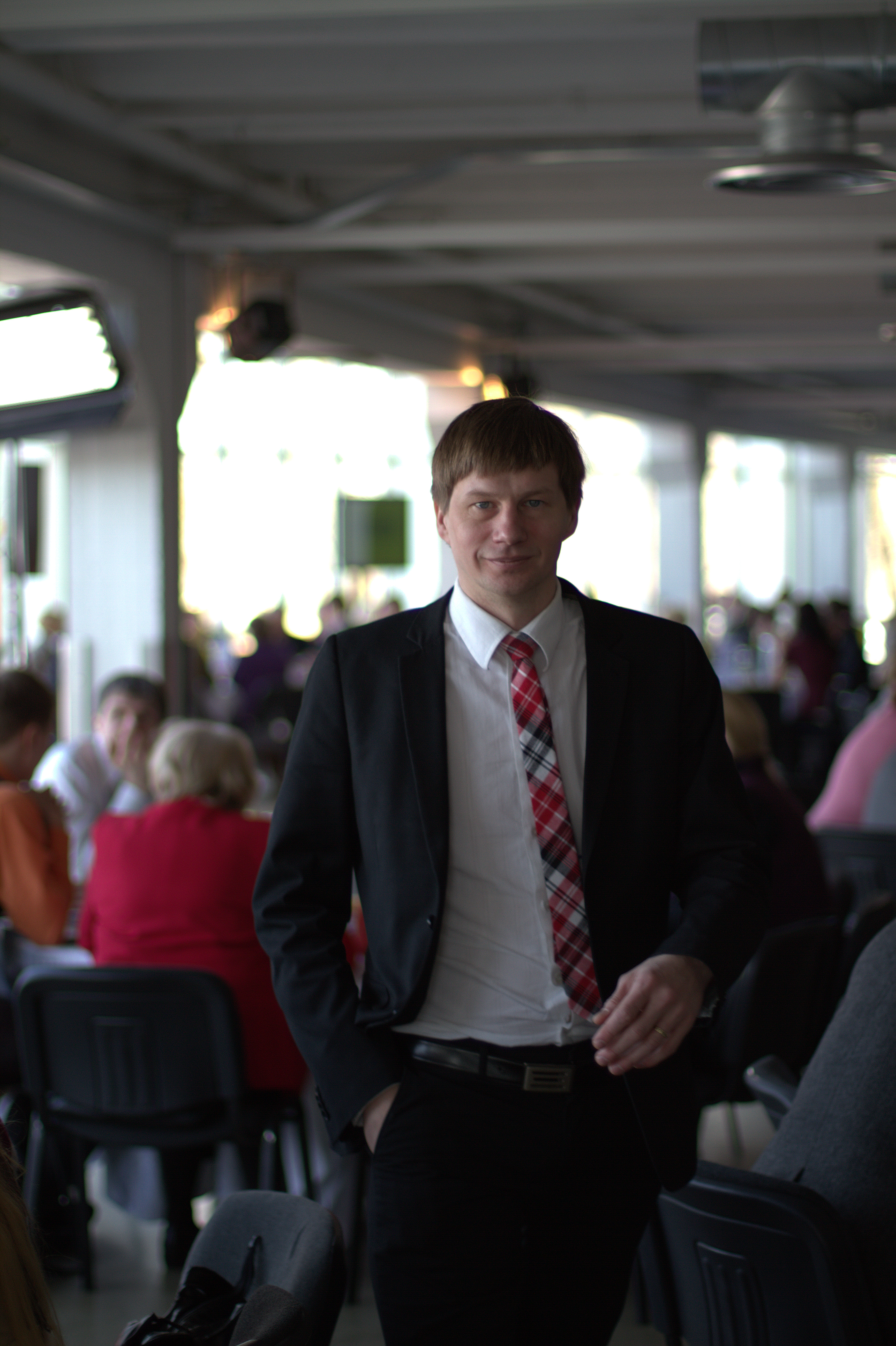 Rahvakogu arutelupäev 6. aprillil 2013 Tallinna lauluväljakul. Silver Meikar.